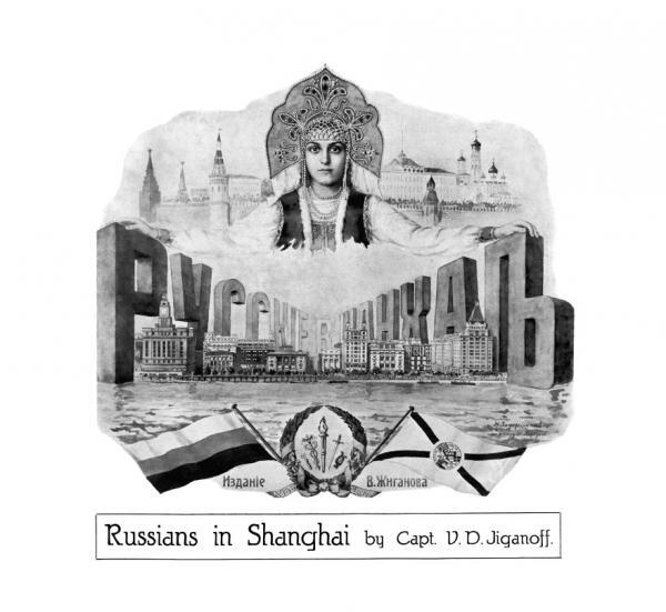 Титульная страница альбома "Русские в Шанхае" 1936 года.